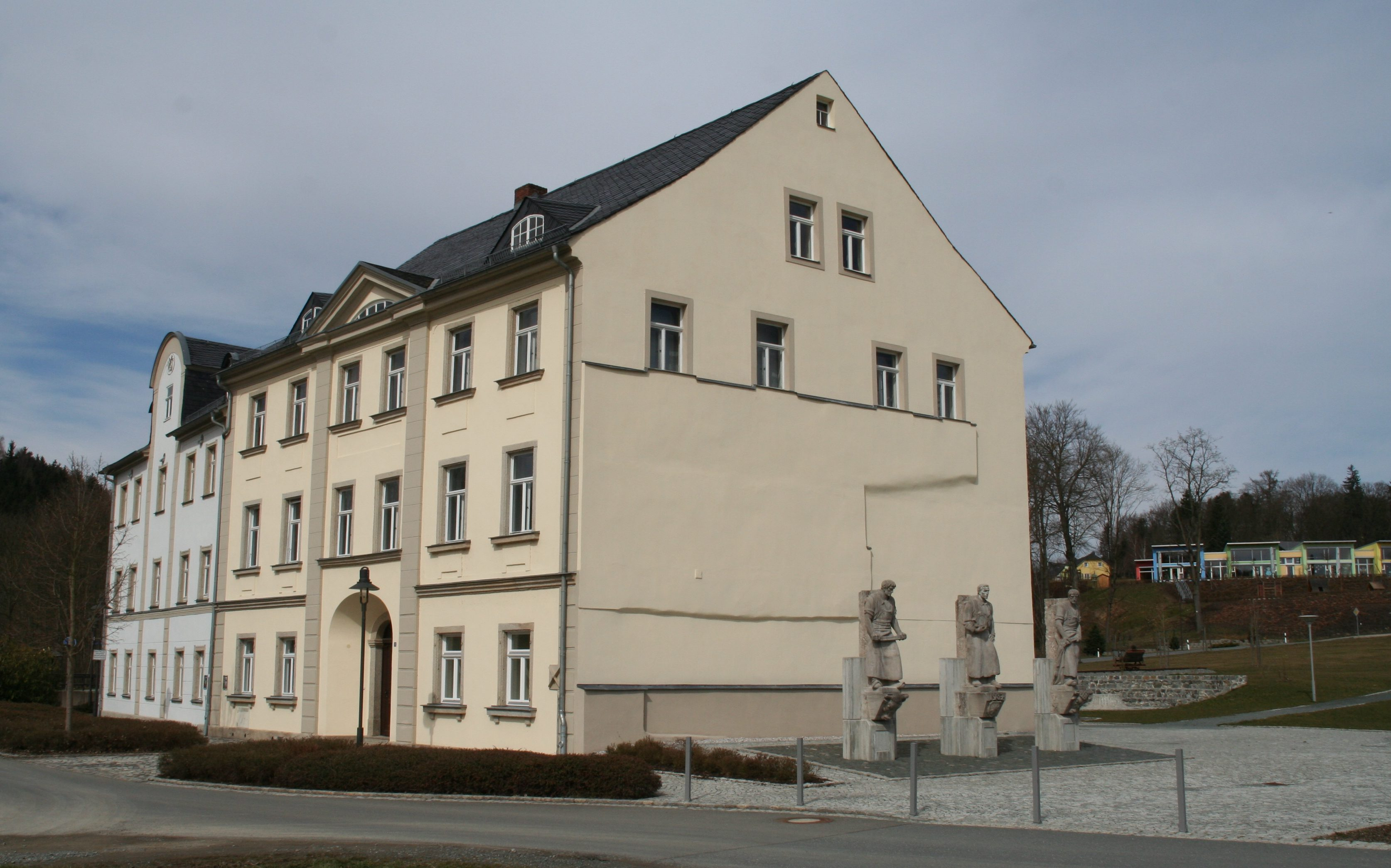 Hirschberg im Saale-Orla-Kreis, Museum für Gerberei und Stadtgeschichte